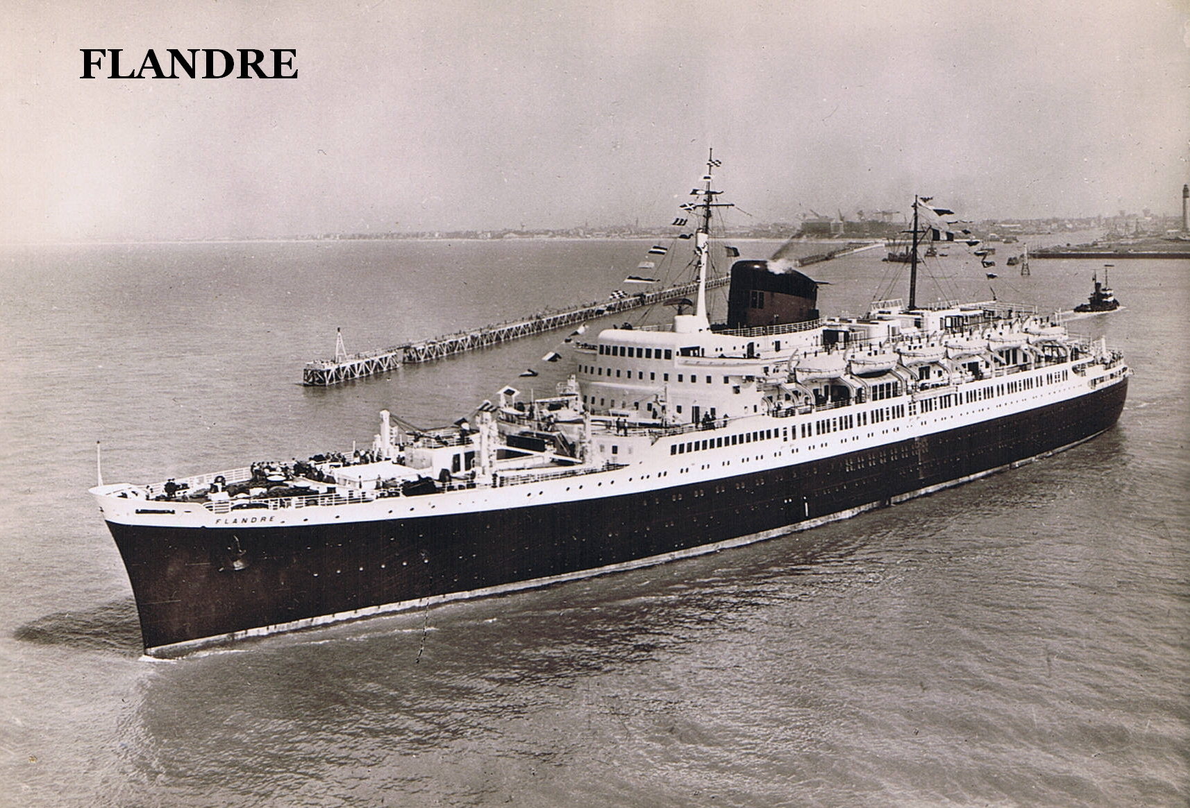 Vue en mer du FLANDRE